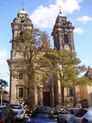 Egidienkirche